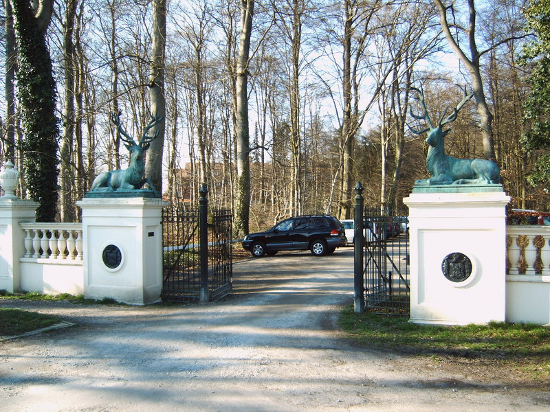 Hirschtor - Eingang zum Schlosspark in Rastede, selbstgeknipst, März 2005, GNU-FDL